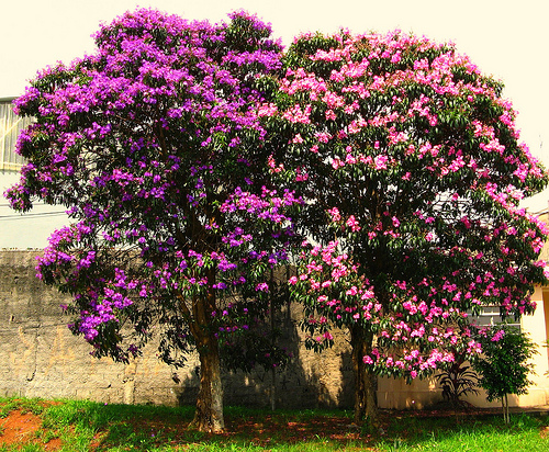 quaresmeiras roxa e rosa